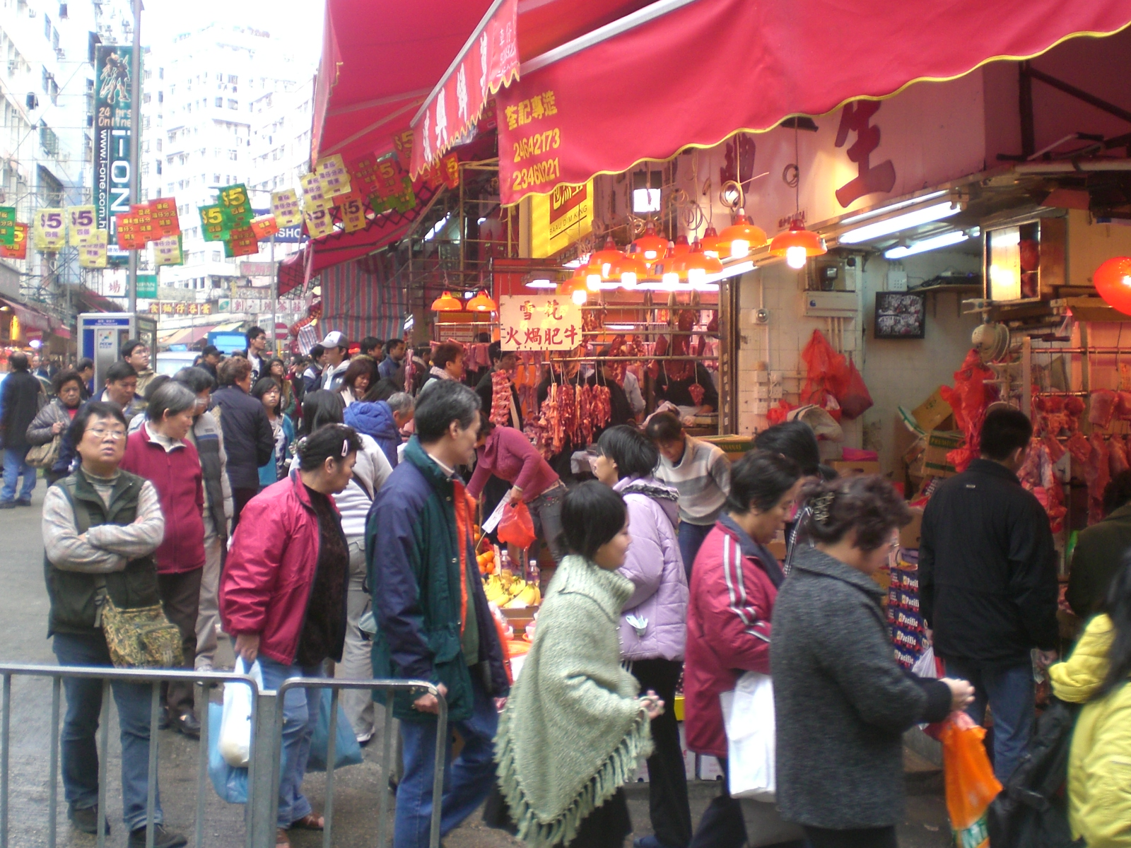 觀塘瑞和街街市